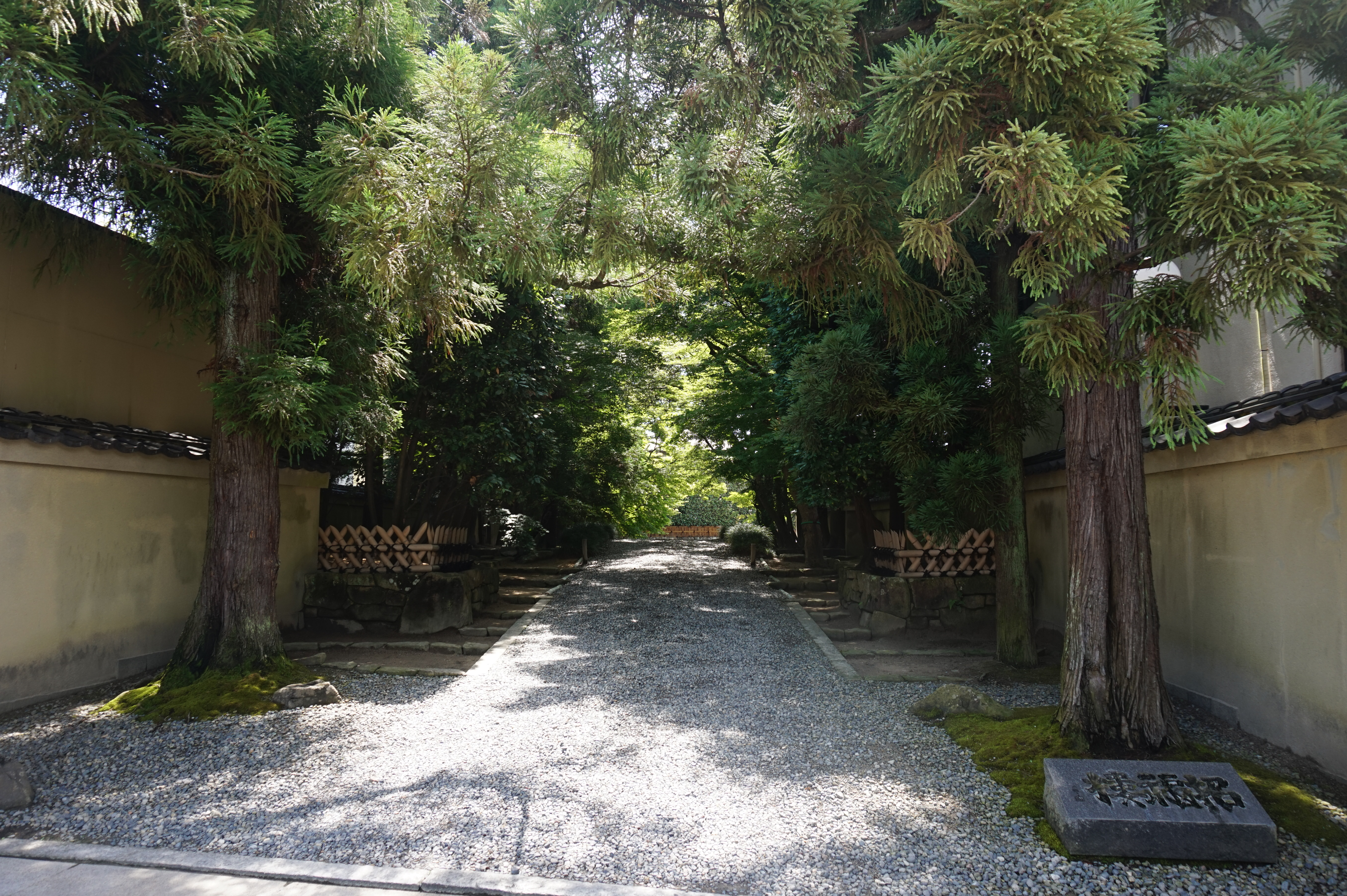 滋賀県東近江市の招福楼本店。